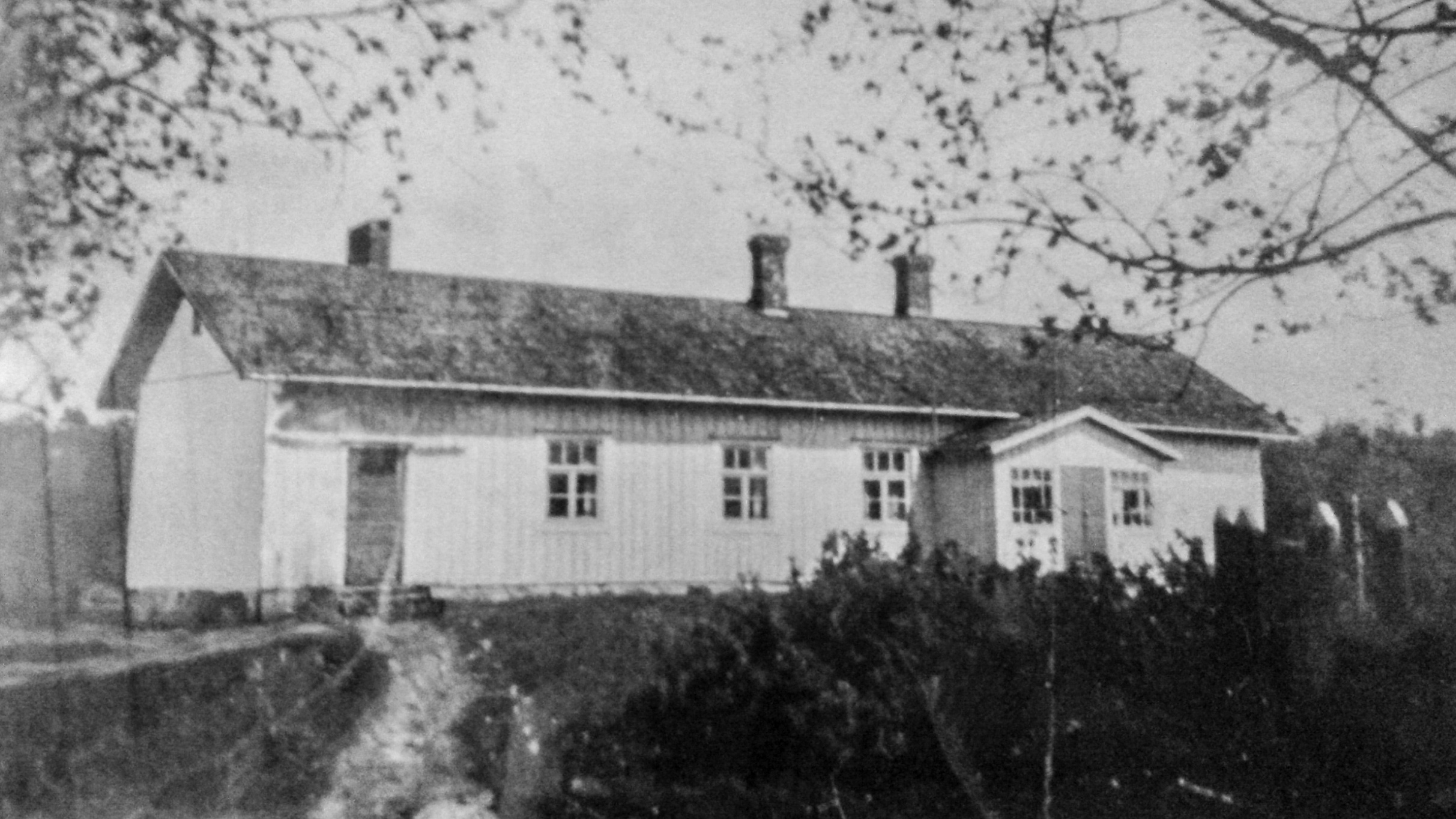 Description